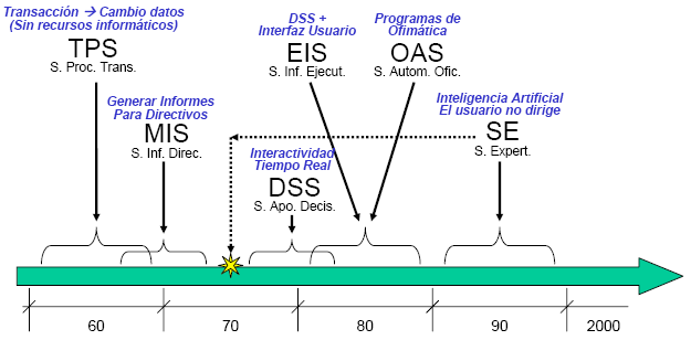 Evolución temporal de los sistemas de información (TPS, MIS, DSS, EIS, OAS y SE)